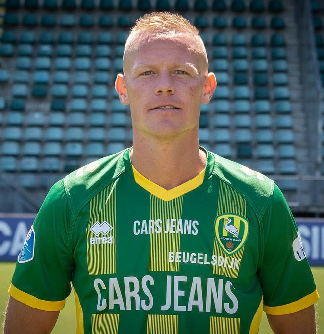 Tom Beugelsdijk